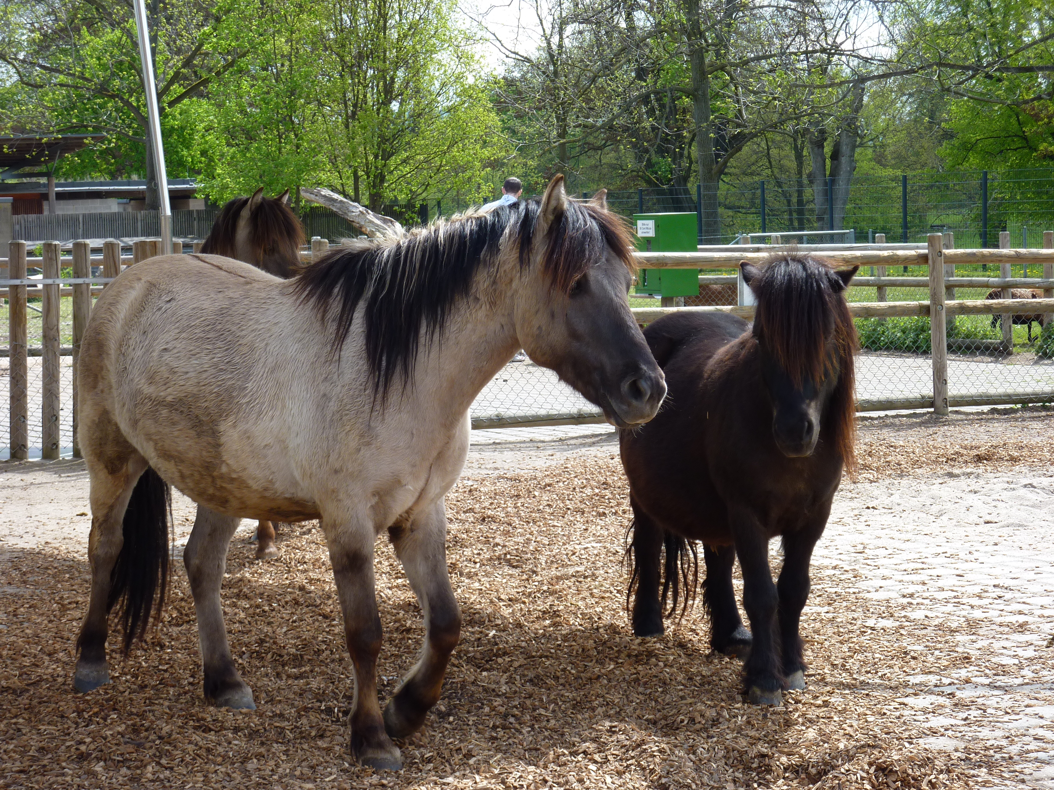 Ponys (Dülmener und Shetländer) im Schaubauernhof der Wilhelma